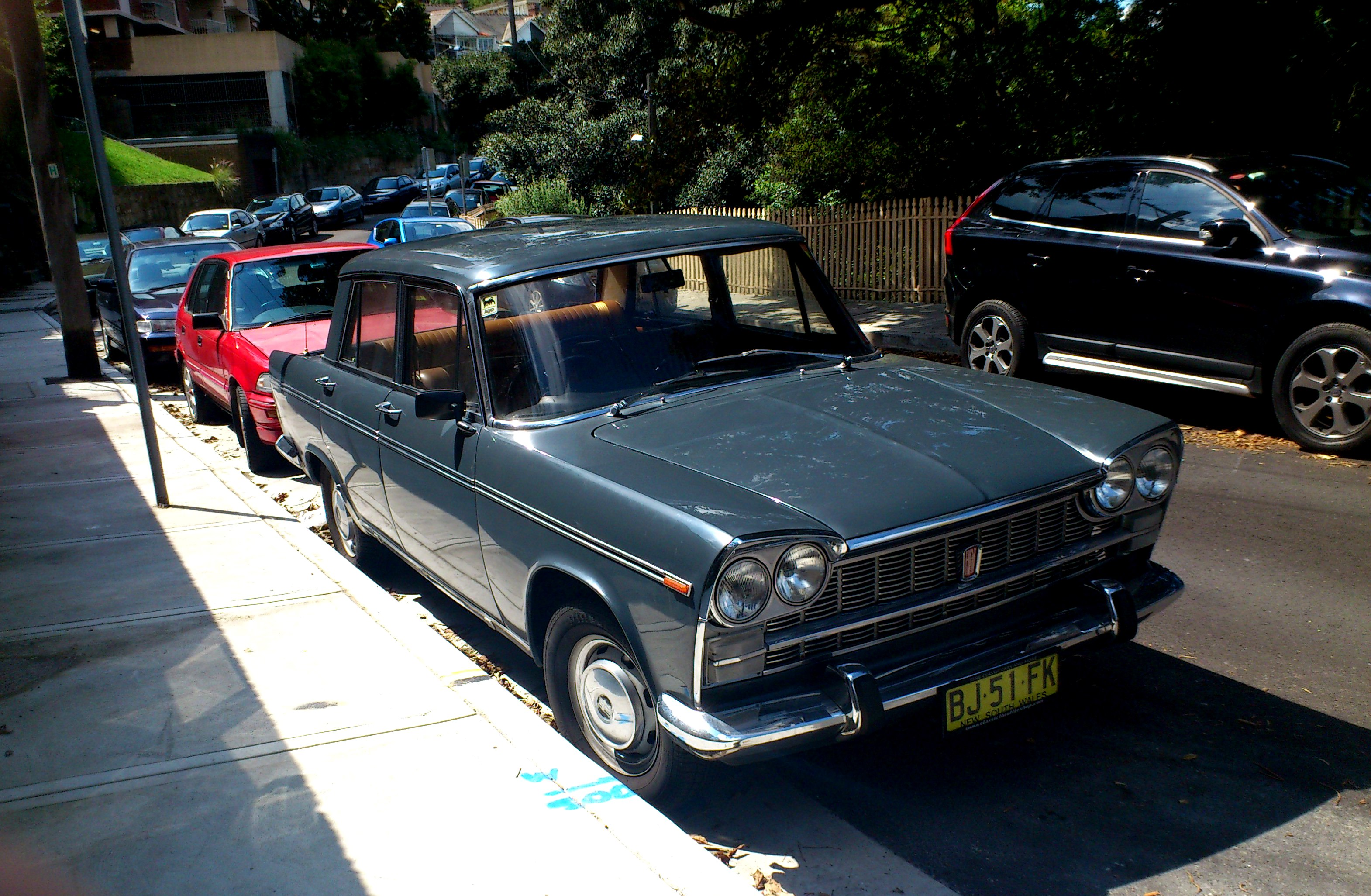 Fiat 2300 automatic